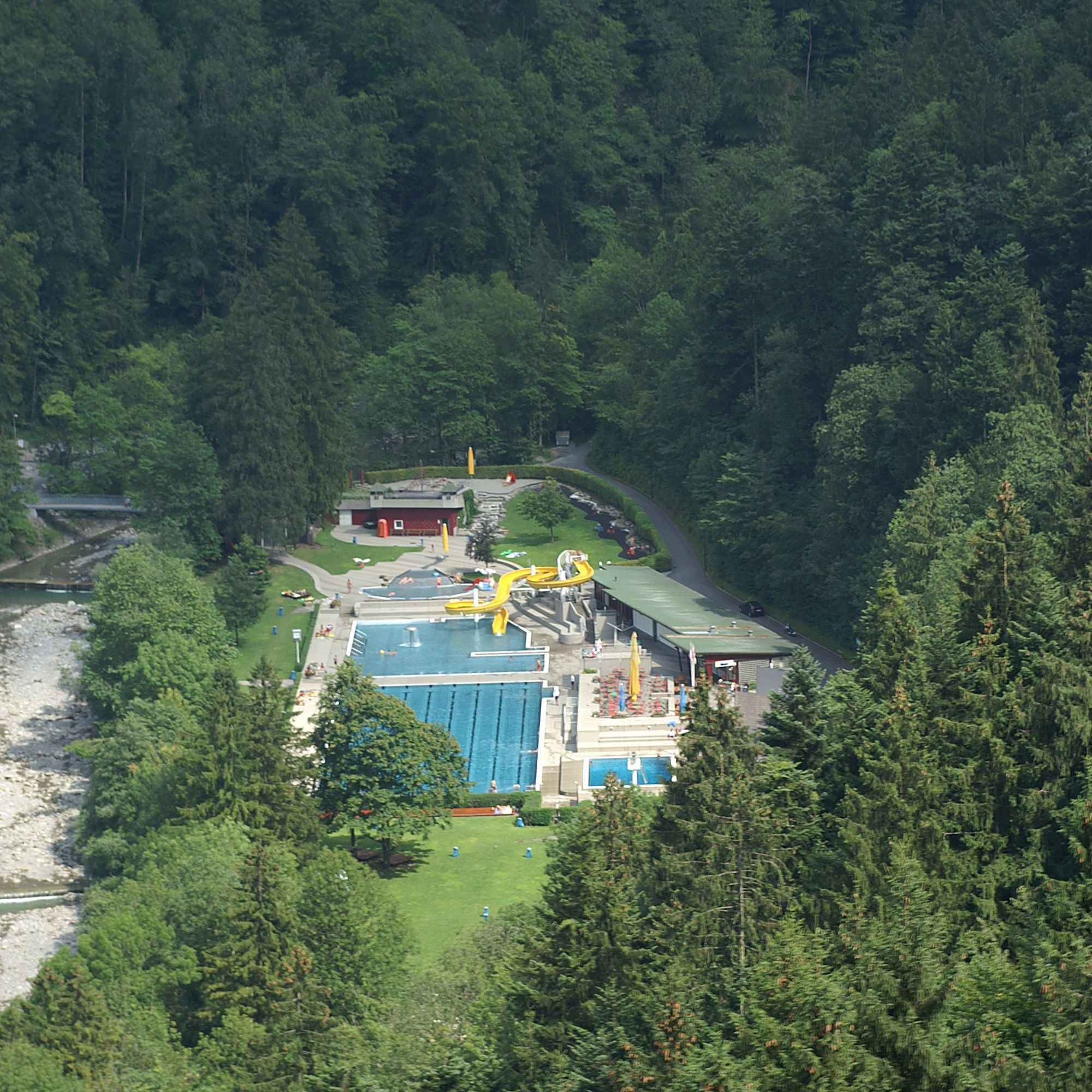 Blick auf das Waldbad Enz in Dornbirn, links die Dornbirner Ache